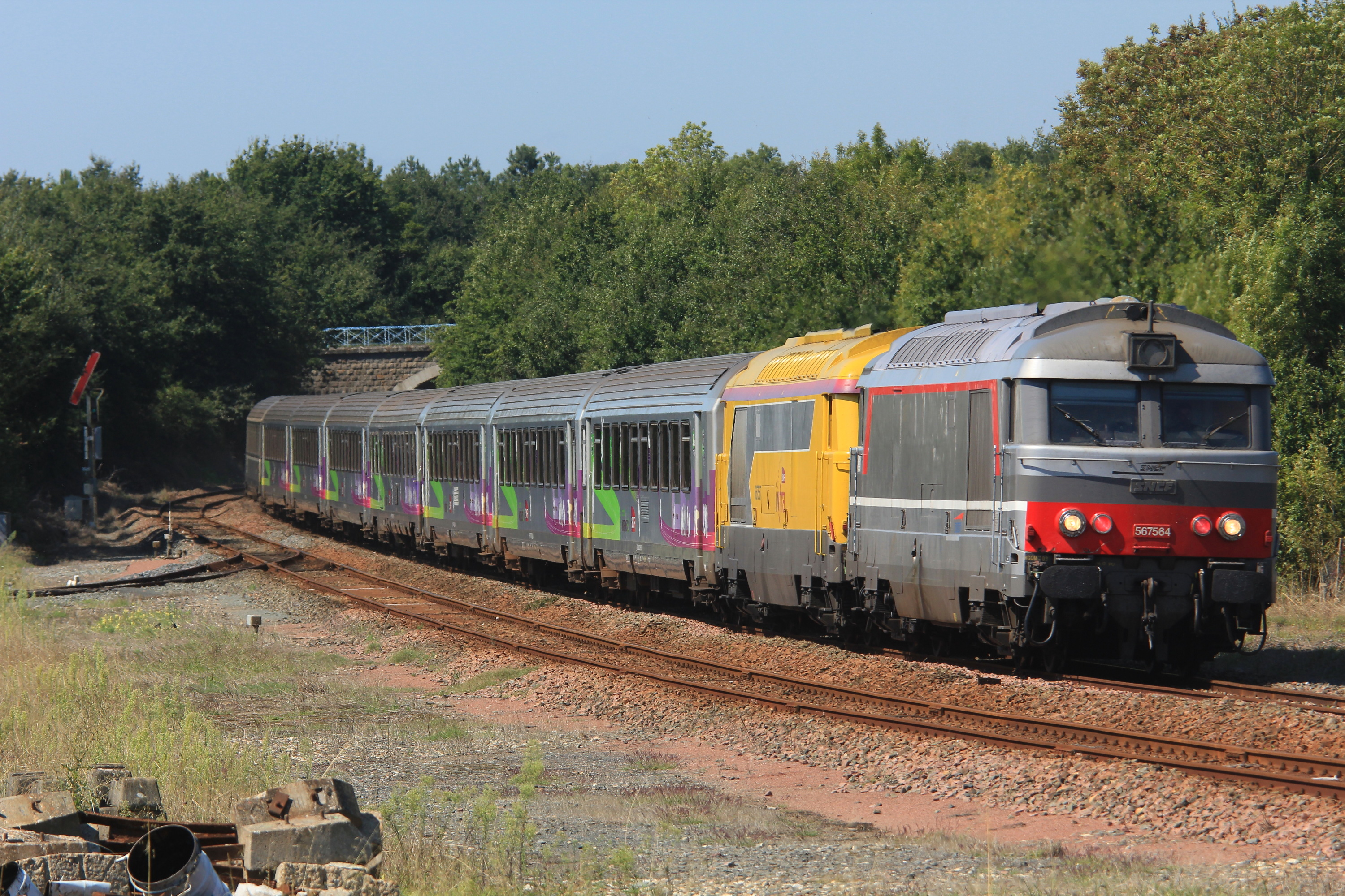 Le train Intercités n°3835 (Nantes - Bordeaux) tiré par la BB 67564 en livrée multiservice et la BB 67567 en livrée Infra et composé de 8 voitures Corails passe en gare du Champ-Saint-Père en Vendée, en France. Au fond, se trouve un sémaphore de bloc mécanique Nantes-Bordeaux.